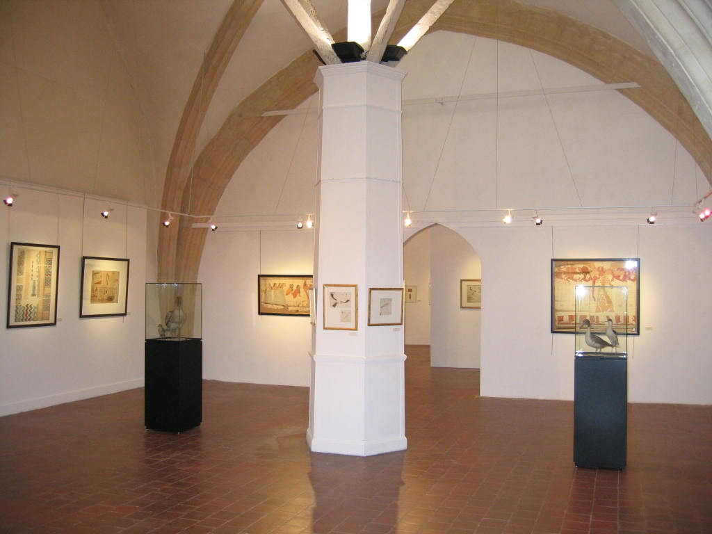 EXPOSITION H. BOUSSAC ET L'EGYPTE, 2004, Musée des Beaux-Arts de Béziers